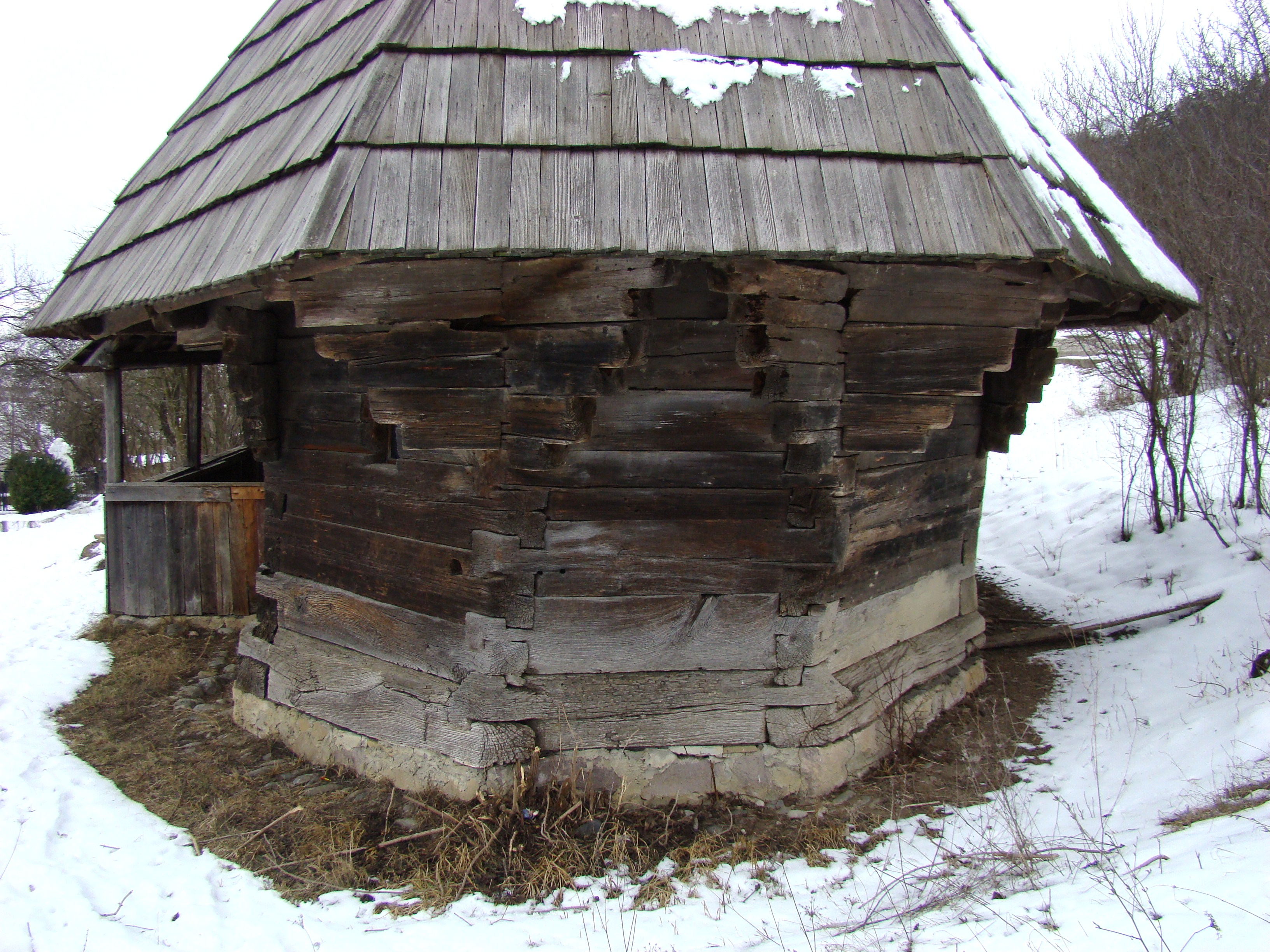 Silivașu de Câmpie, Bistrița-Năsăud